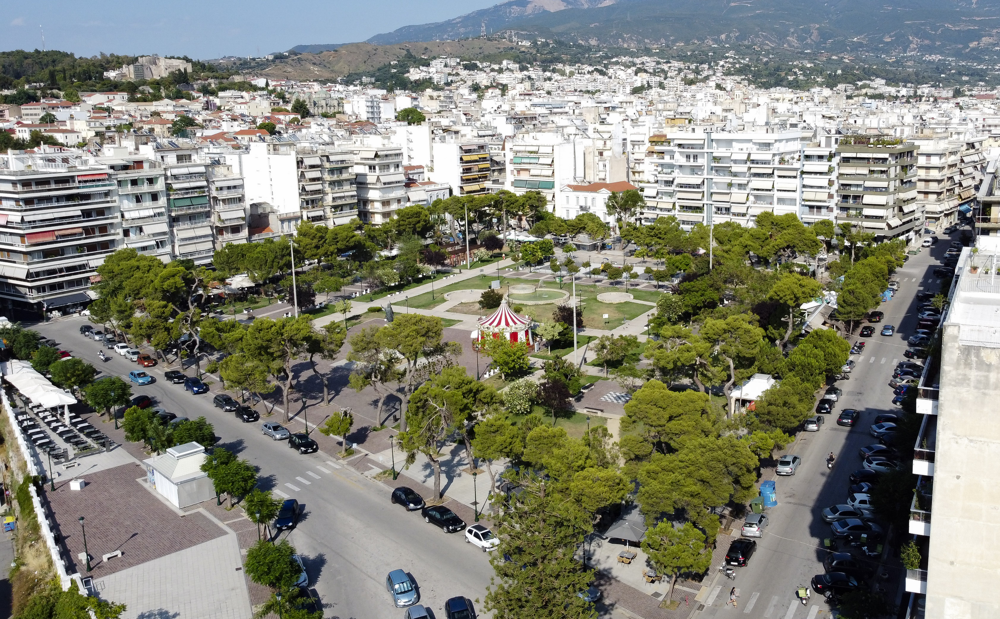 Η πλατεία Υψηλών Αλωνιών